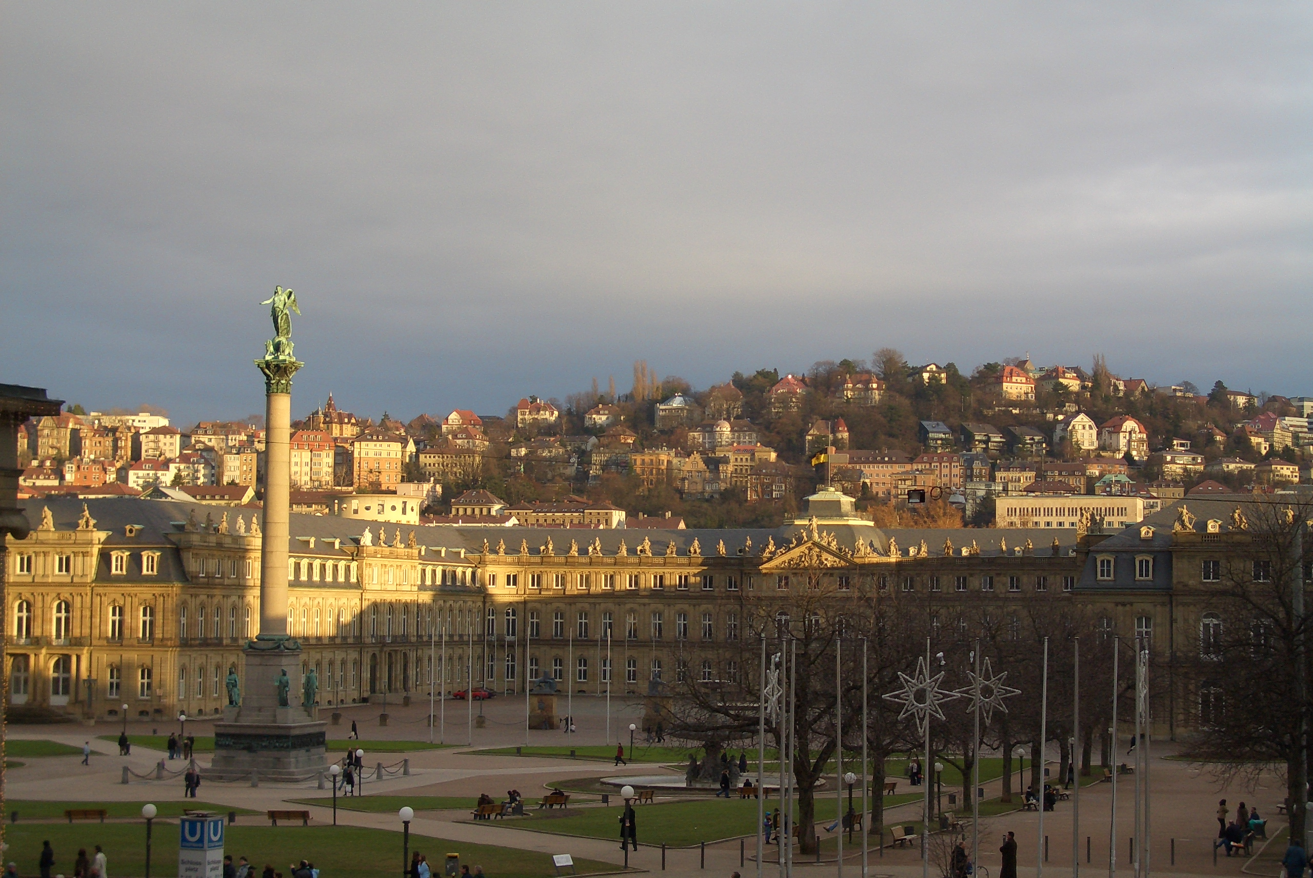 Stuttgart: Blick vom Kleinen Schloßplatz auf den Schloßplatz